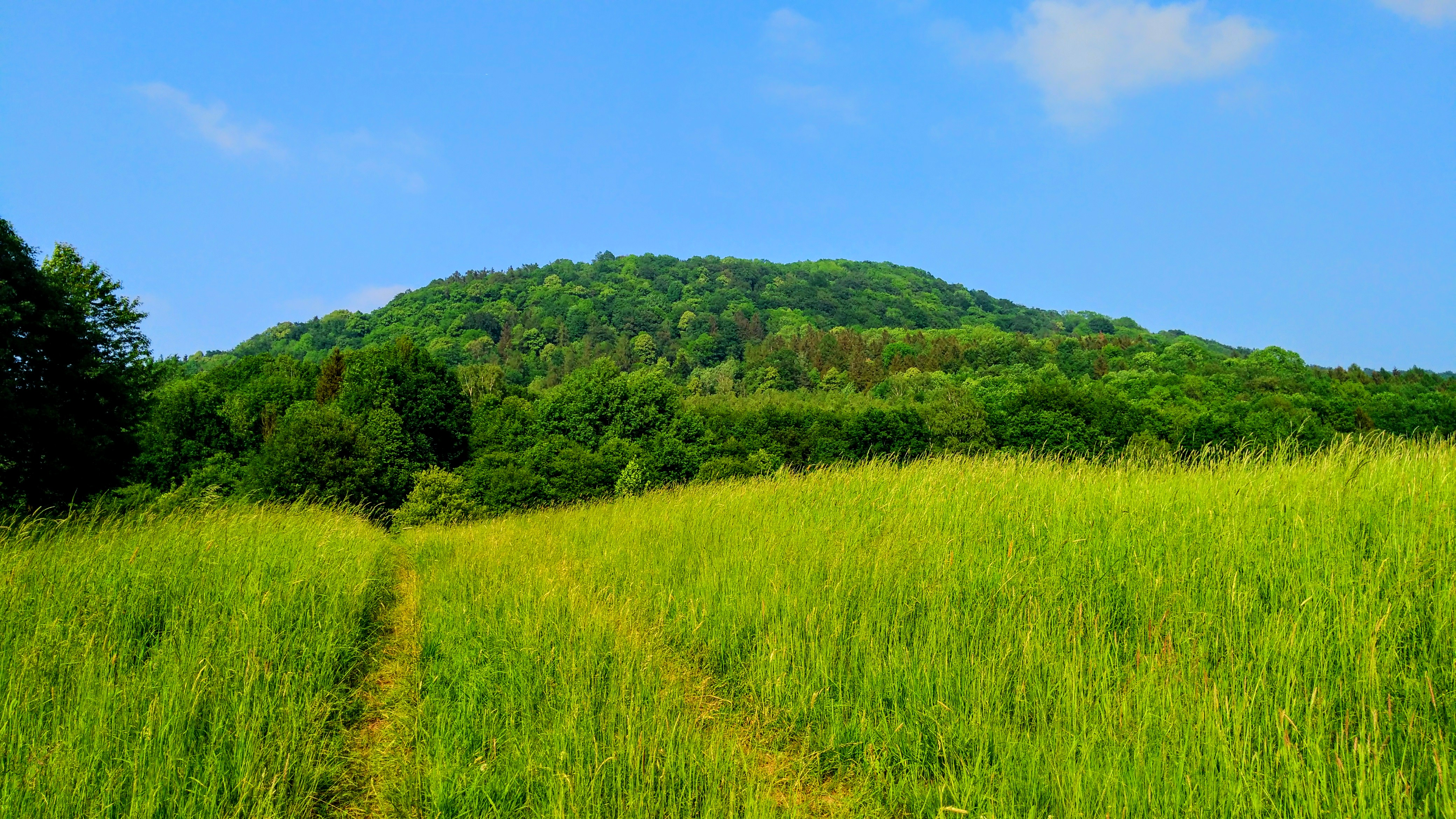 Hora.